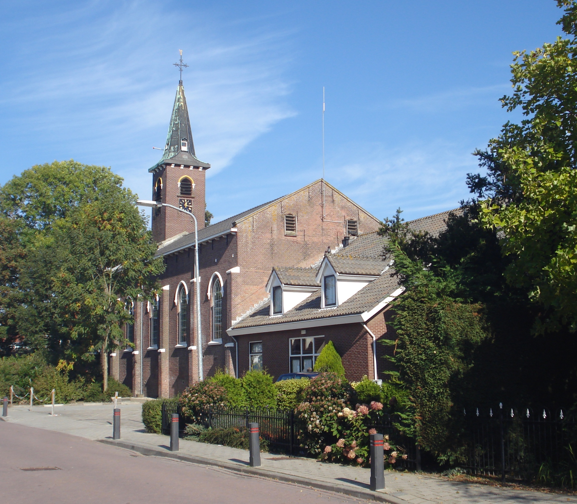 Zicht op een deel van de Dorpskerk- Hersteld Hervormde Gemeente Melissant, Julianaweg 2, 3248 AN Melissant